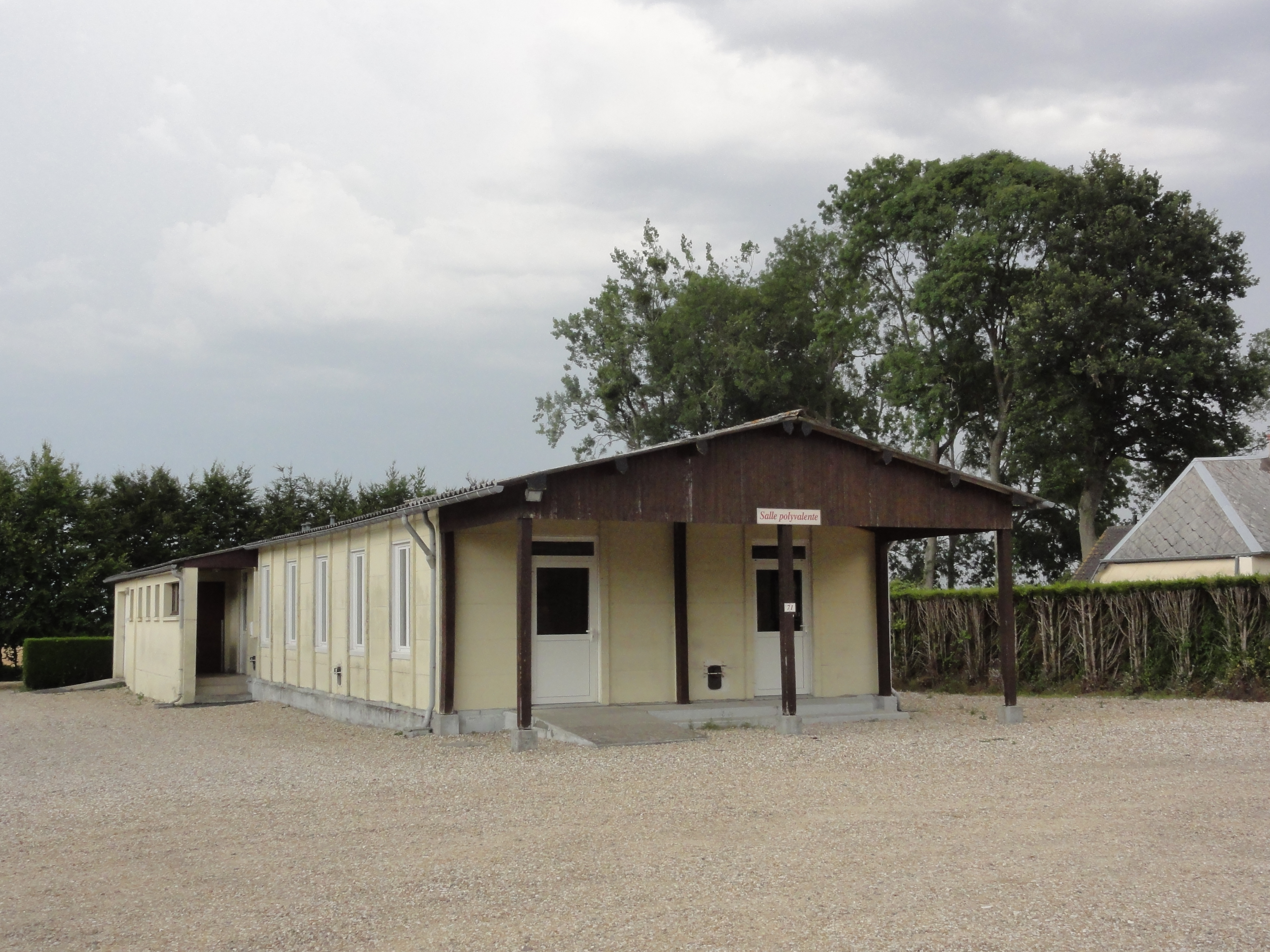 Foucart (Seine-Mar.) salle polyvalente